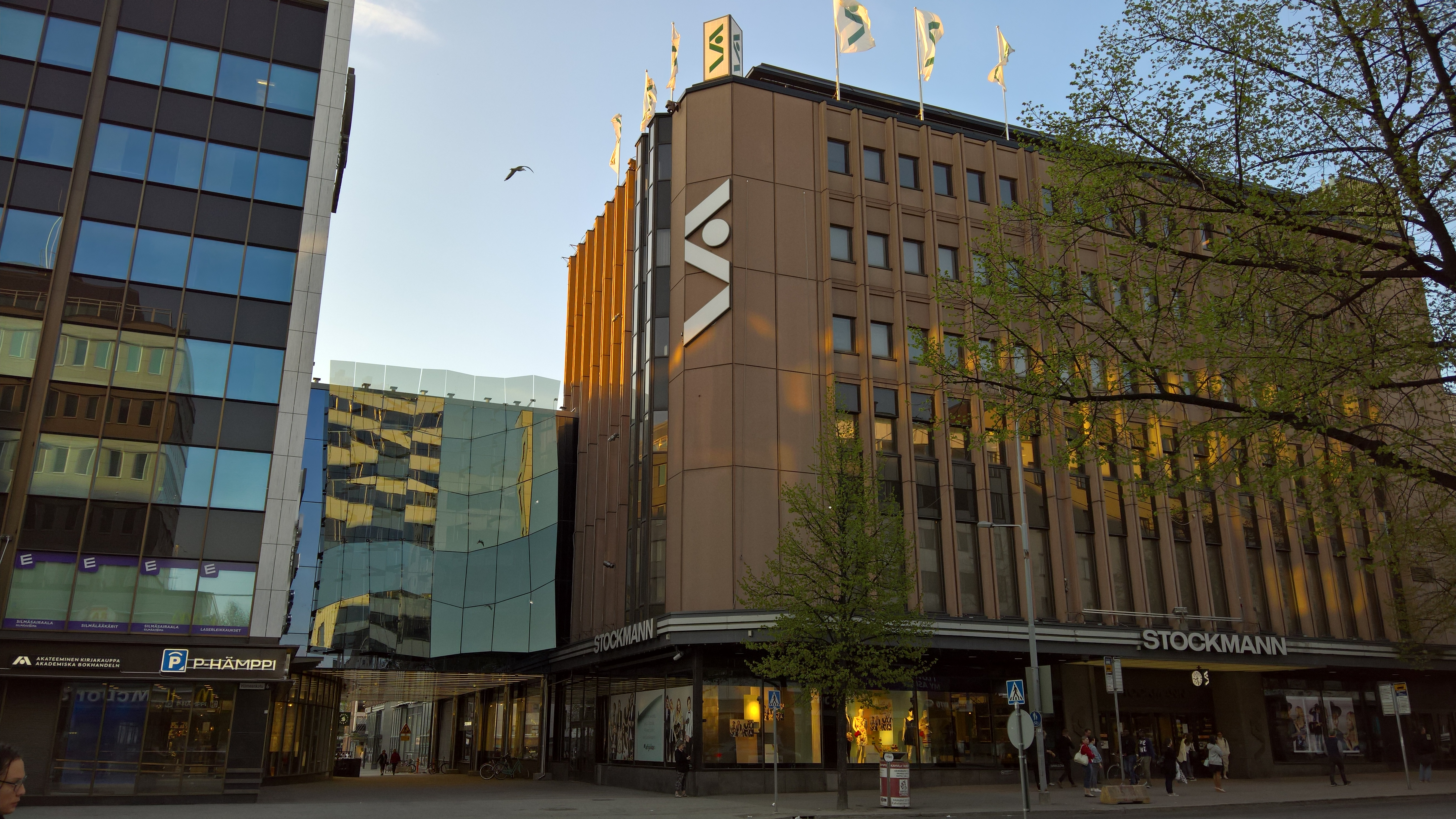 Stockmannin Tampereen tavaratalon julkisivu Hämeenkadun ja Tuomiokirkonkadun risteyksestä kuvattuna toukokuussa 2016.